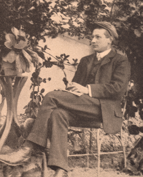 Ernst Goll gest. 1912